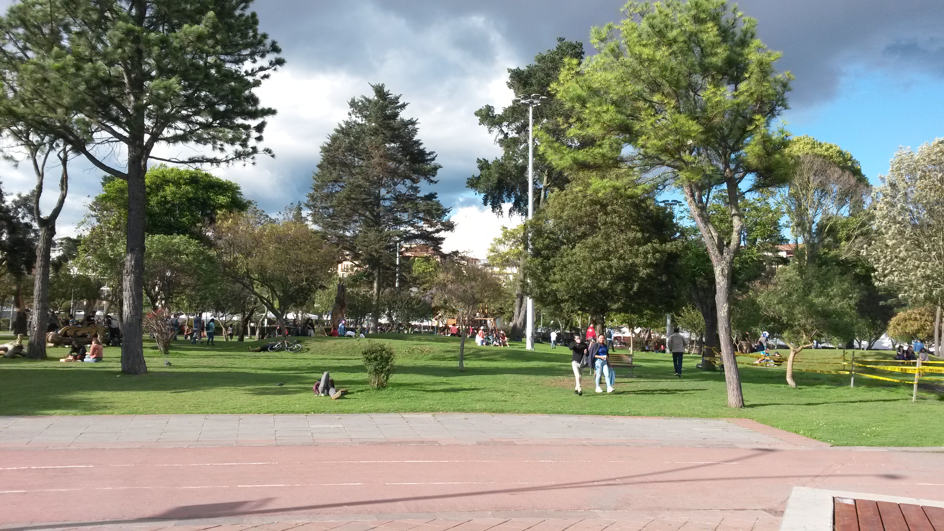 Parque de la Madre Kvenko - Ekvadoro